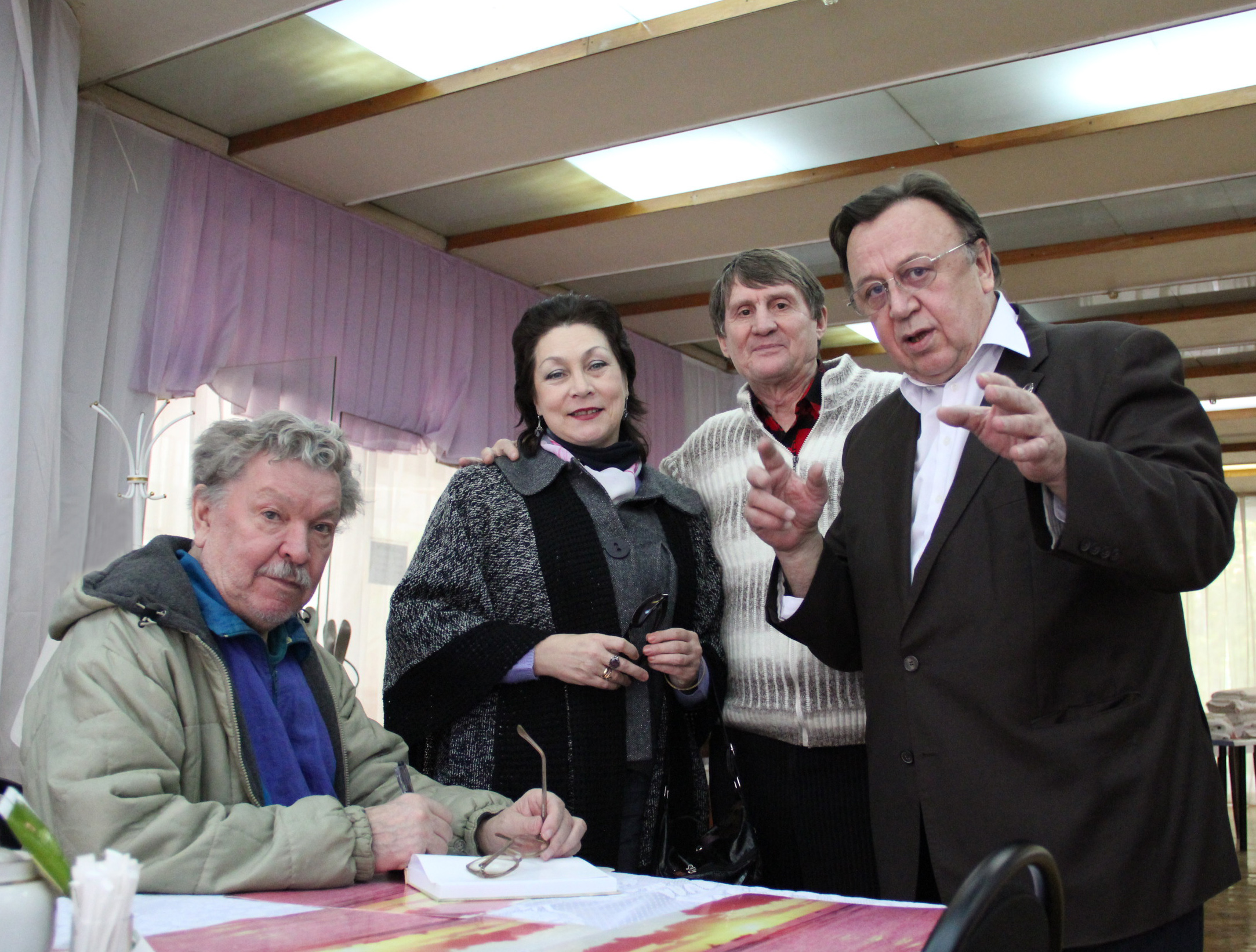 Великий русский поэт Валентин Устинов (на снимке слева) с почитателями его таланта в Переделкине. 2011 год.